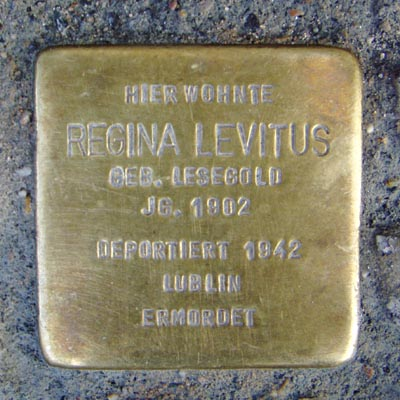 Stolperstein Höhenstraße 18 für Regina Levitus Freigabe [Ticket#2013102810006014] erteilt von Initiative Stolpersteine Frankfurt am Main e.V.